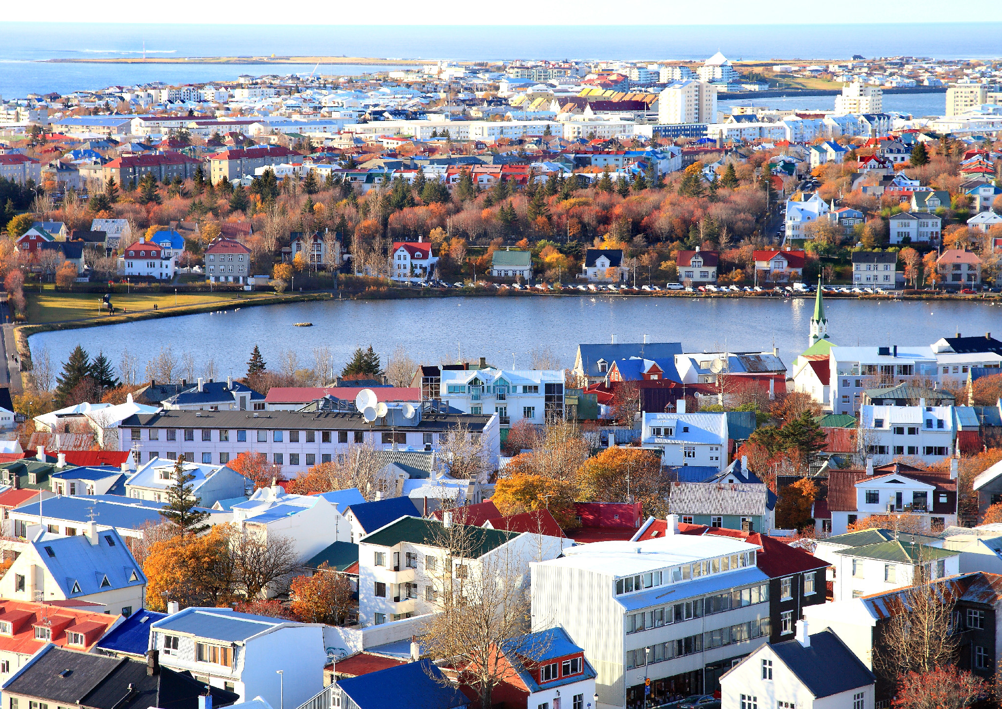 View from Halgrimskirjka, Reykjavik